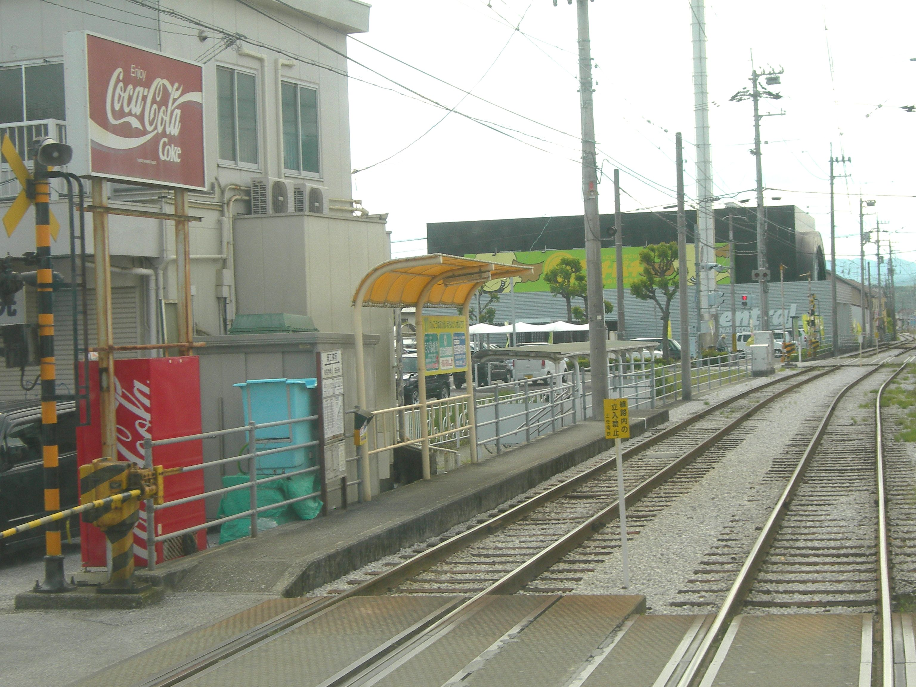 土佐電気鉄道東工業前電停。